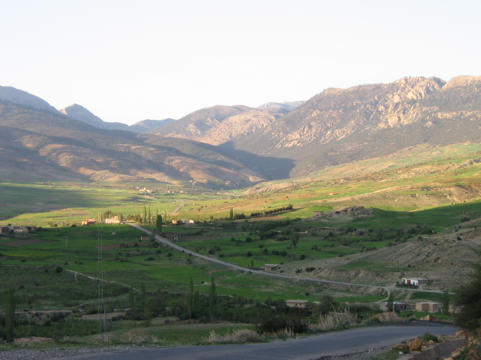 Village du moyen Atlas relevant d'Imouzzer Marmoucha,situé à 25 Kms,localité connue par sa belle cèdraie.